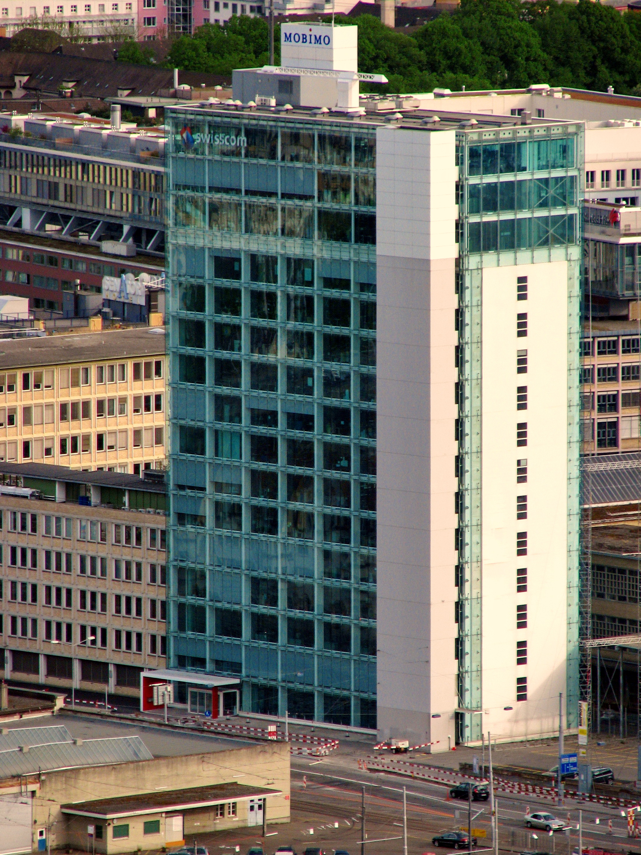 Bluewin-Tower in Zürich-Industriequartier, seen from Käferberg-Waidberg